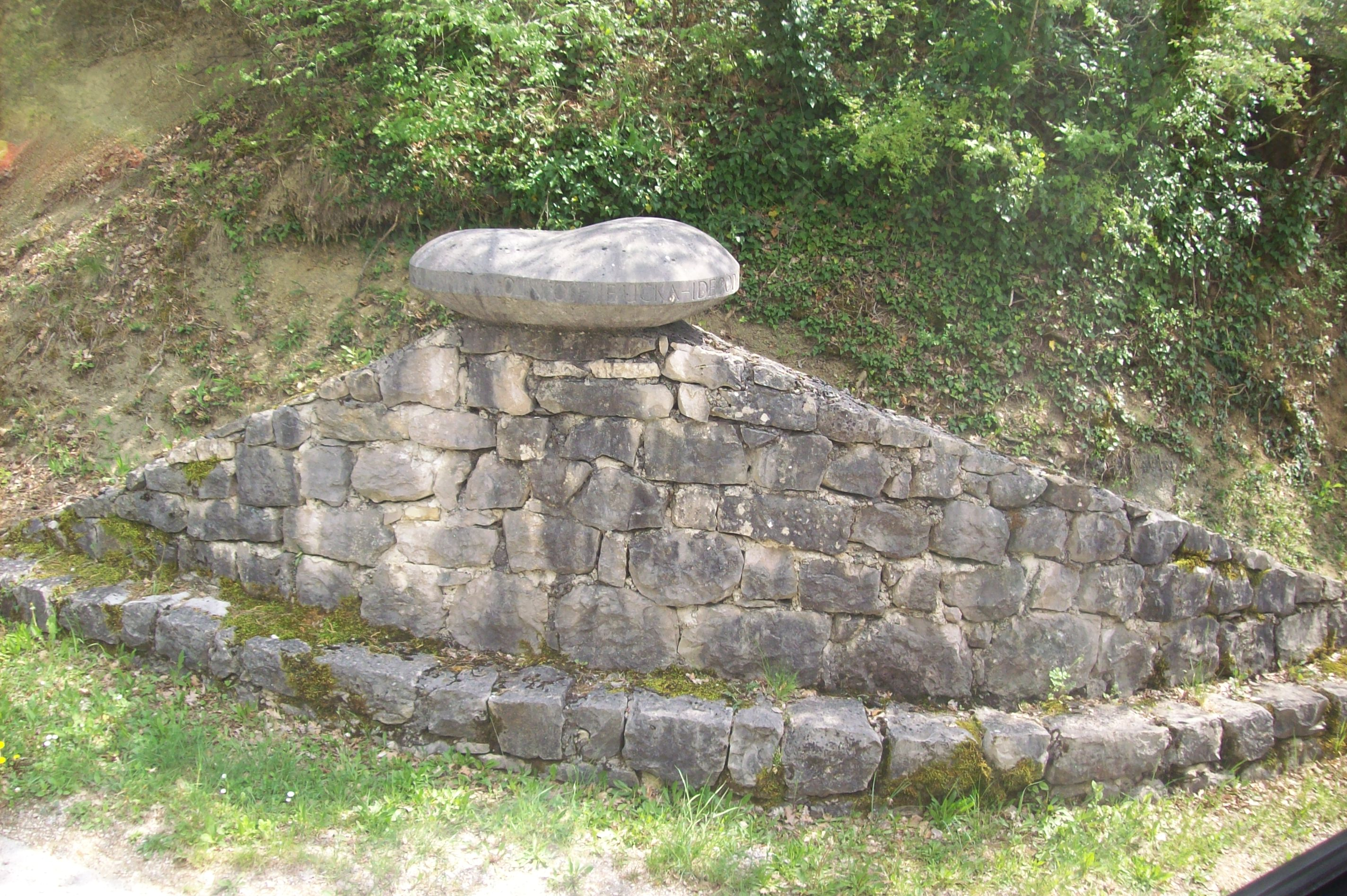 Klanac hrvatskog Lucidara, Aleja glagoljaša, Istra, Hrvatska